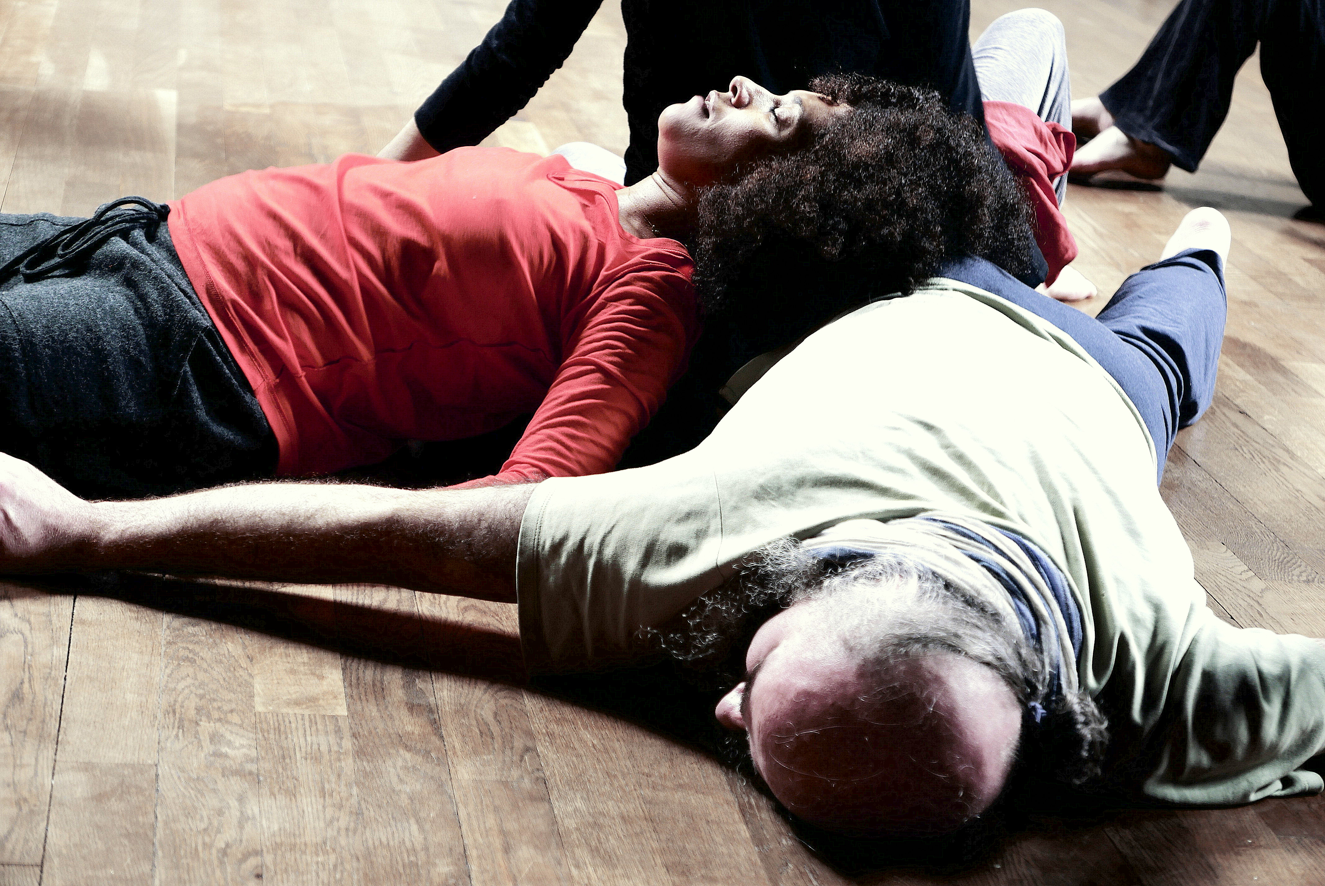 Ceux qui bougent ferment les yeux